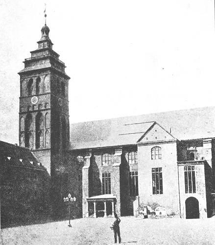 Königberger Schloss mit altem Turmhelm